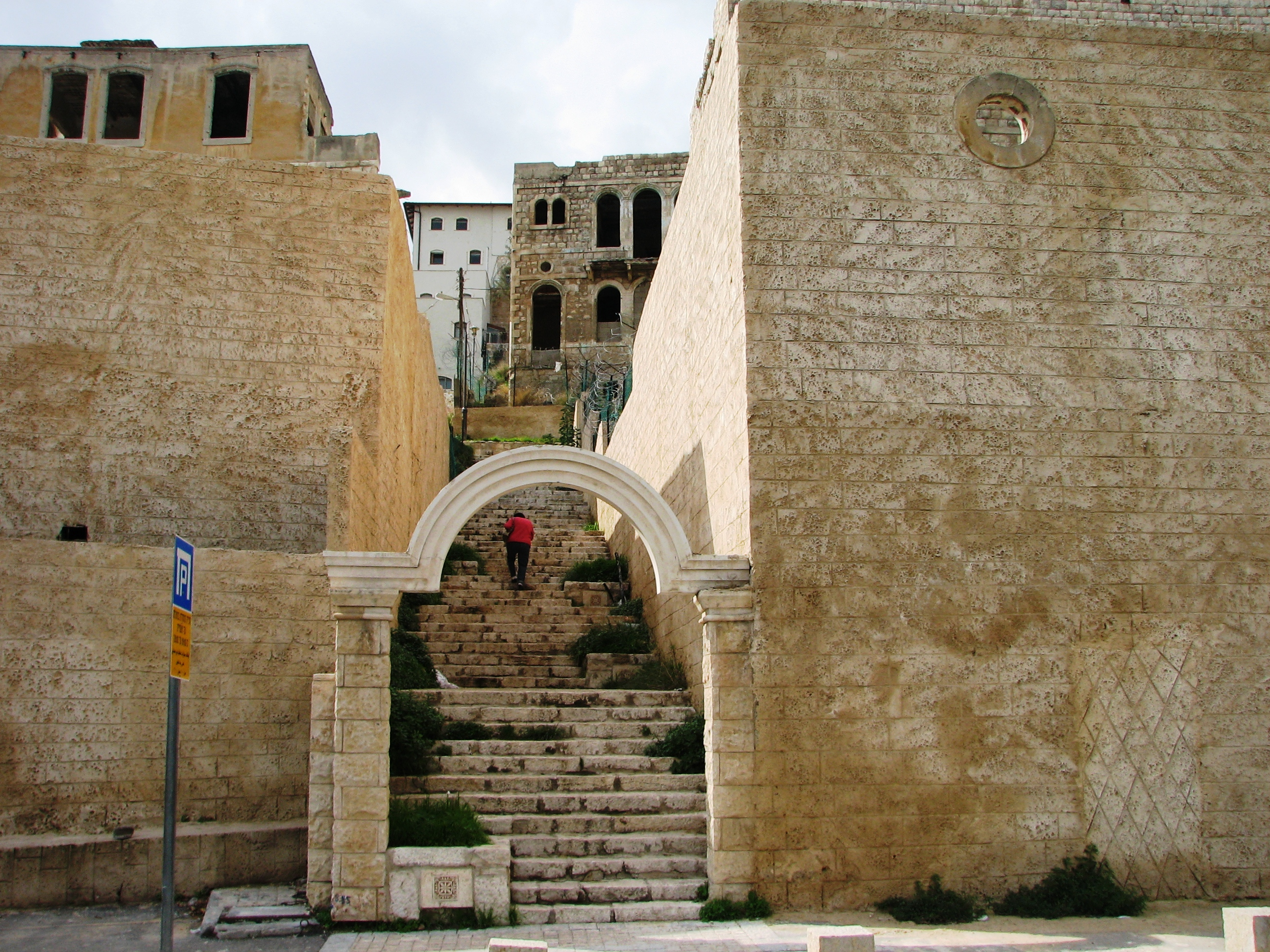 Wadi Salib in Downtown Haifa. ואדי סאליב היא שכונה ברובע העיר התחתית בחיפה. הוקמה בסוף המאה ה-19 על ידי ערבים שיצאו מחומות העיר העתיקה של חיפה. השכונה ננטשה אט אט. בתחילת המאה ה-21 החלה עיריית חיפה בפרויקט שיקום השכונה והפיכתו לרובע אמנים מדרגות עג'לון העולות משיבת ציון לרחוב מעלה השחרור